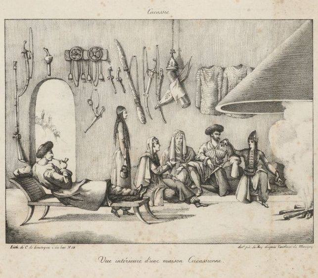 Интерьер черкесского дома.